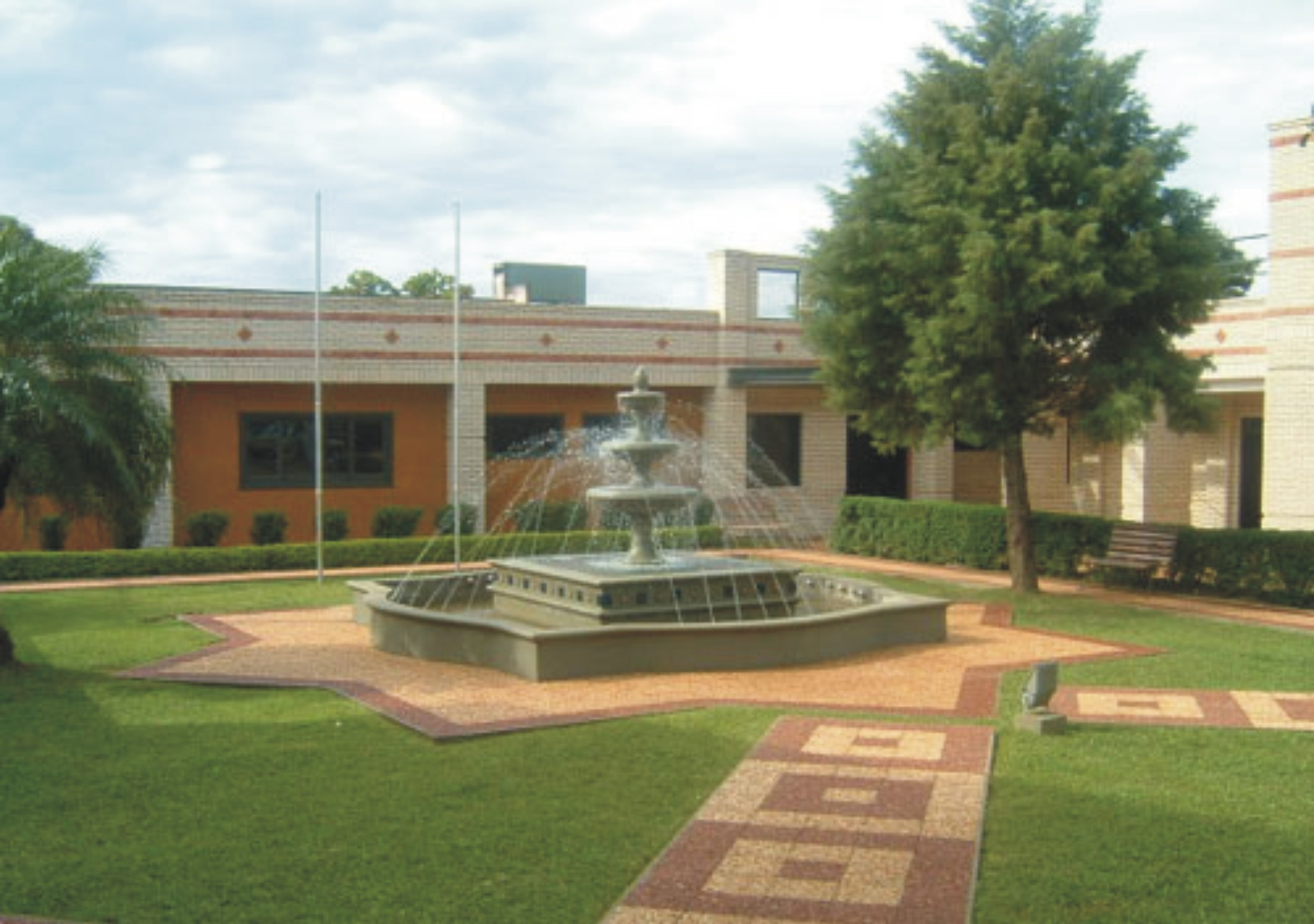 Vista de la Fachada del Palacete Municipal de Coronel Oviedo y la Fuente en su explanada. Ubicada sobre Tuyutí esquina Defensores del Chaco en el micro centro de la Ciudad